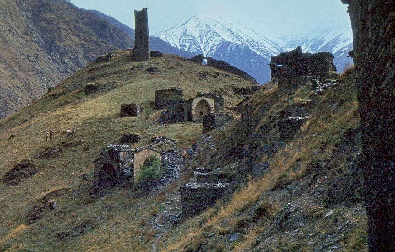 Нохчийн: Tsoy-Peda_1